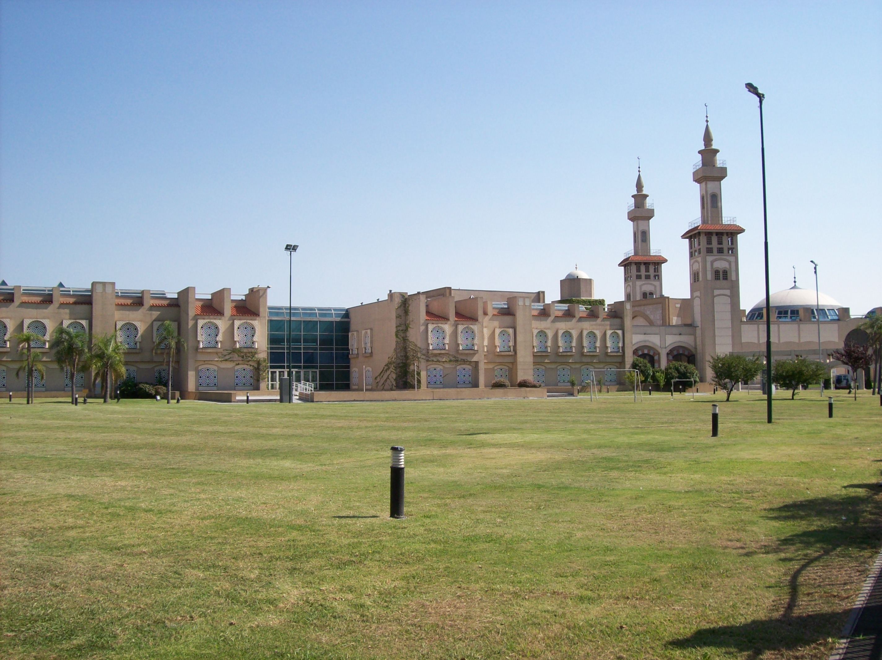 Centro Cultural Rey Fahd, la mezquita más grande de Sudamérica, en Buenos Aires, Argentina.